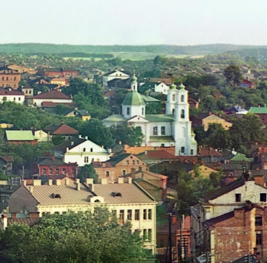 Беларуская (тарашкевіца): Віцебск (Viciebsk), вуліца Заручаўская (vulica Zaručaŭskaja). Царква Ўваскрасеньня Хрыстова